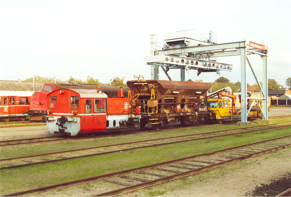 Description: Der Containerkran im Bahnhof Nakskov mit der aus Deutschland stammenden M 17. Author: Olaf Just Source: Olaf Just Date: 19.10.2001